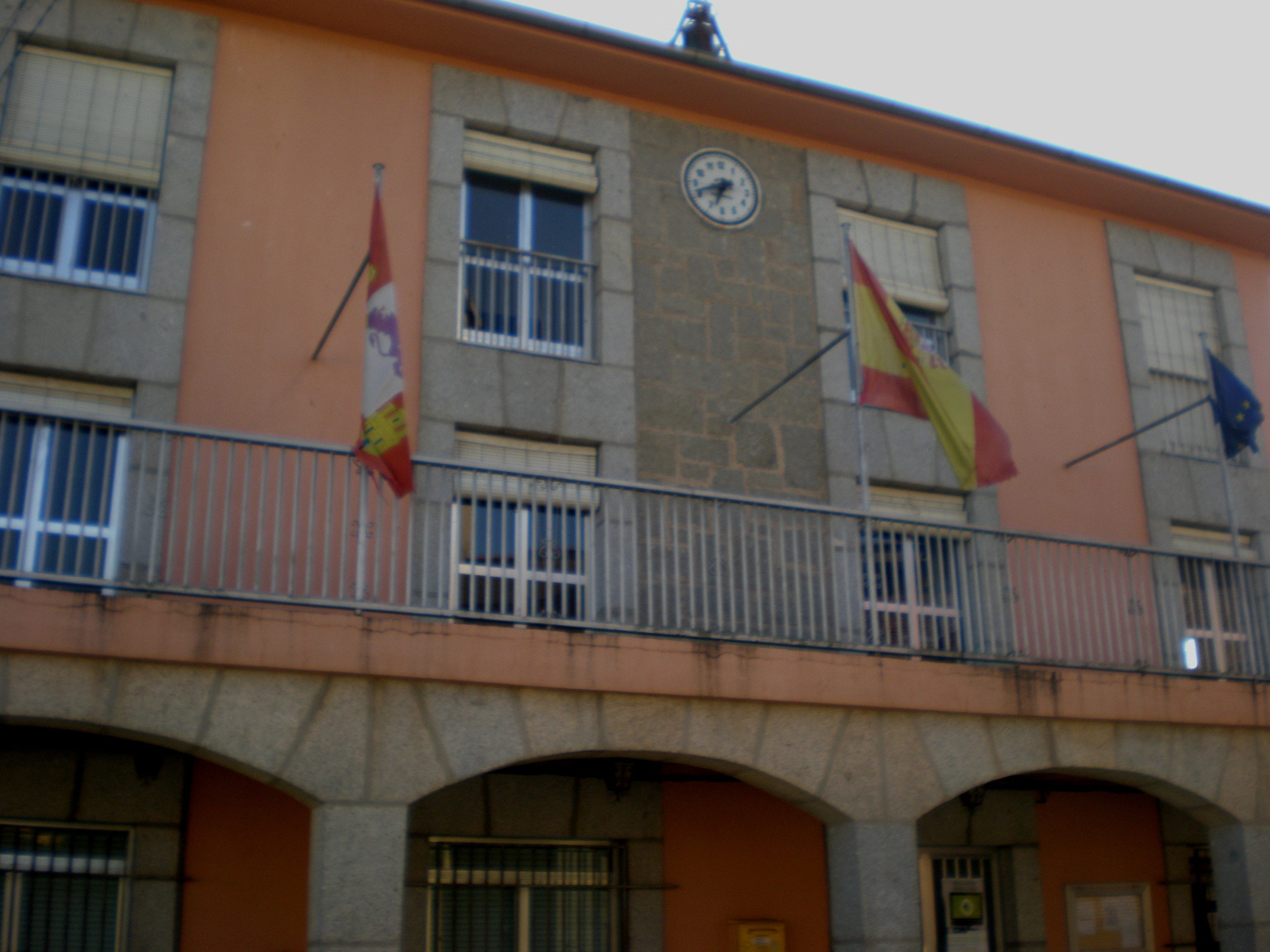 Casa Consitorial